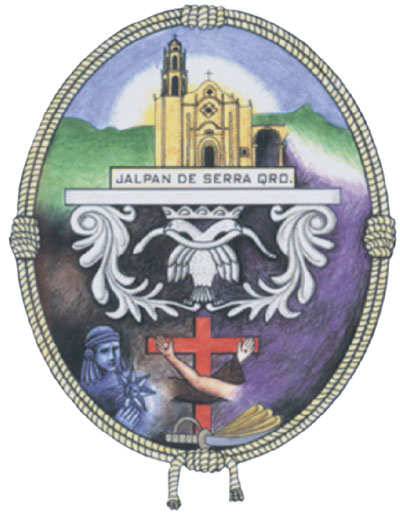 Escudo de armas de jalpan de serra